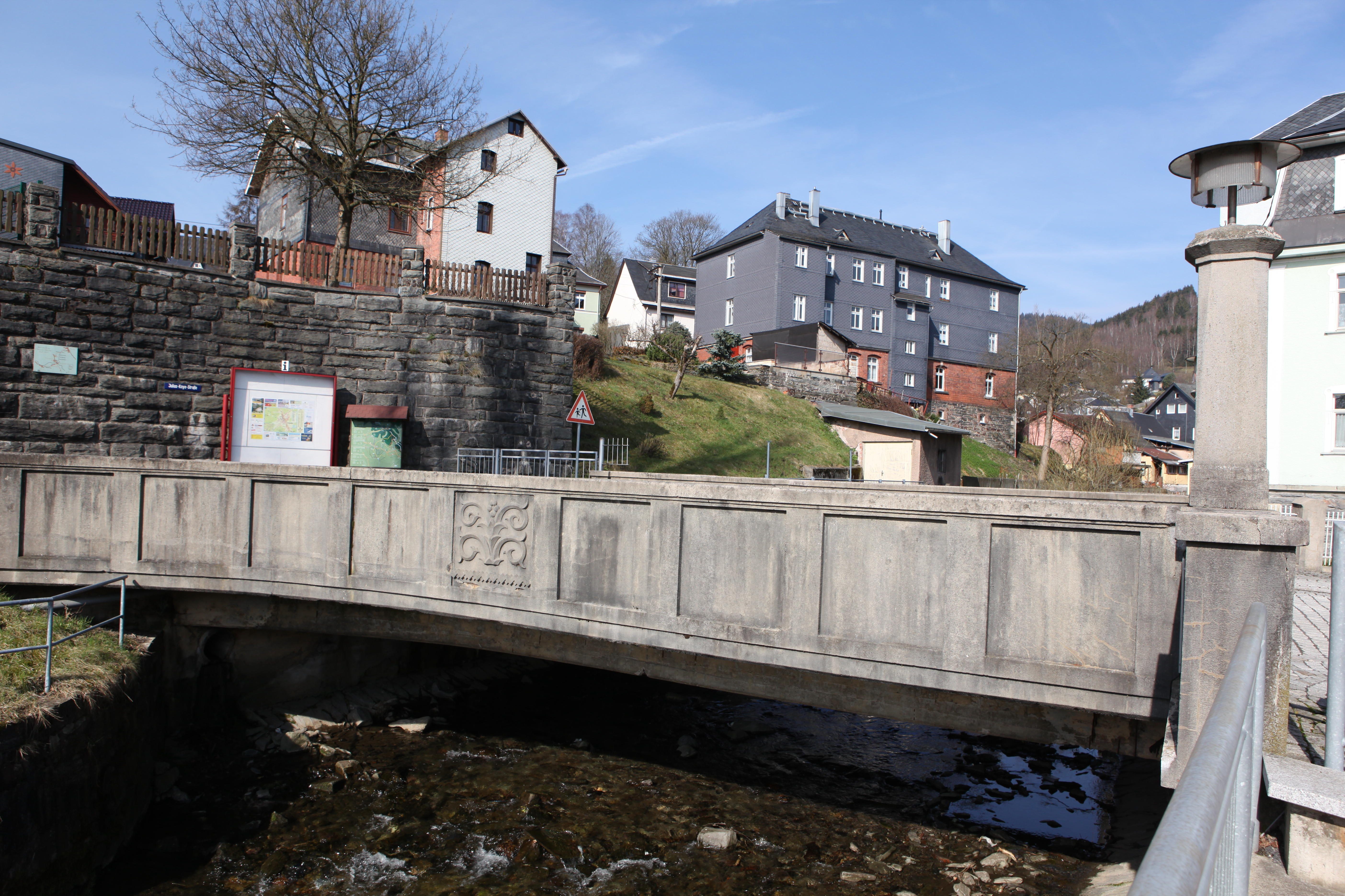 Brücke über die Steinach, Marktplatz, Steinach in Thüringen